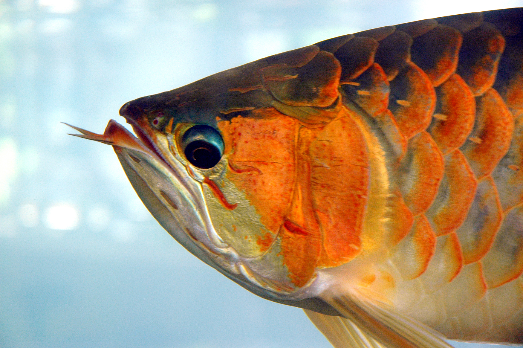 Arowana (Scleropages legendrei)